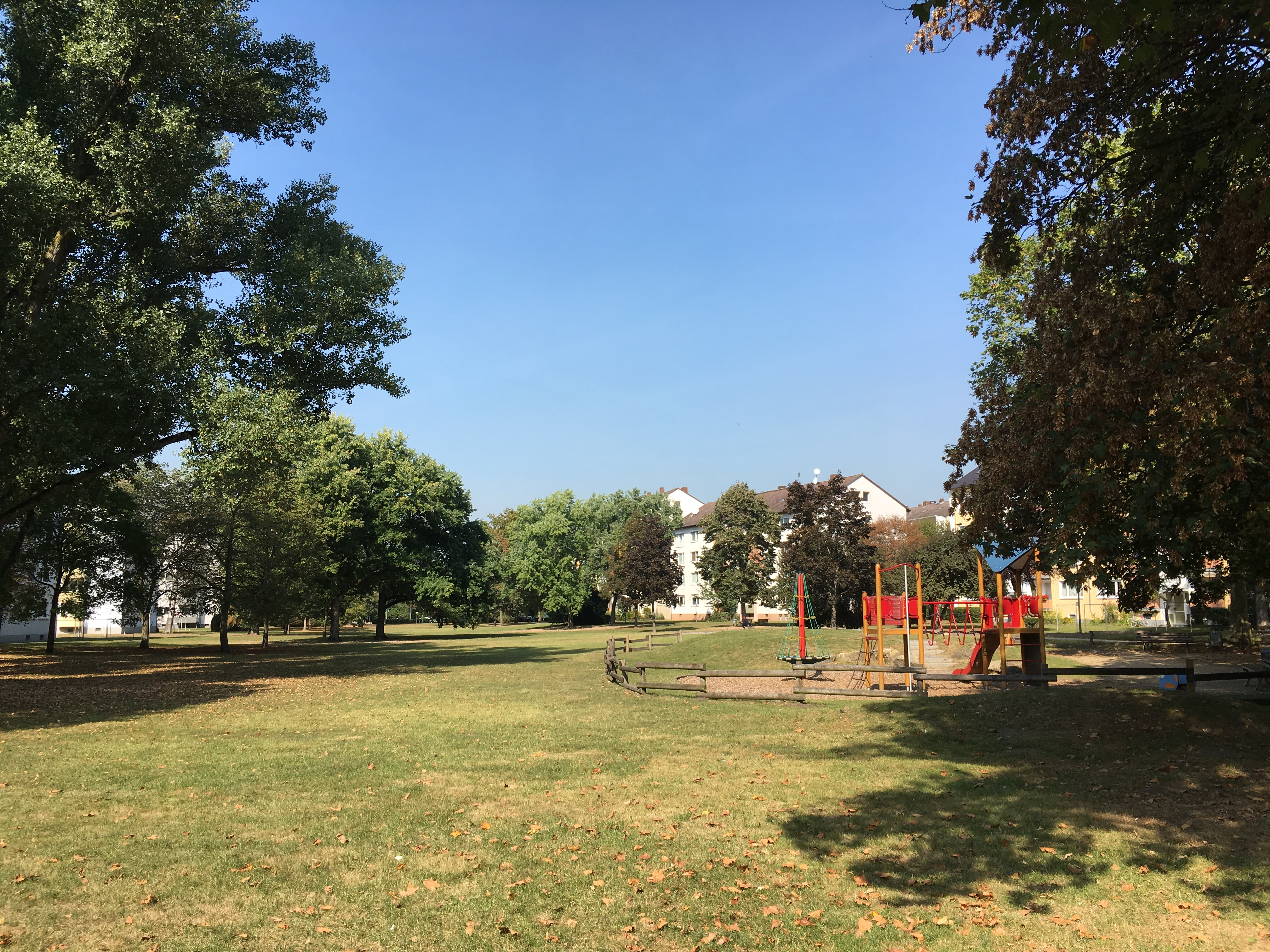 Adolf-Miersch-Siedlung in Frankfurt-Niederrad; erbaut überwiegend in den 1950er Jahren; nach dem Baustadtrat Adolf Miersch benannt; Grünanlage Rudolf-Menzer-Anlage